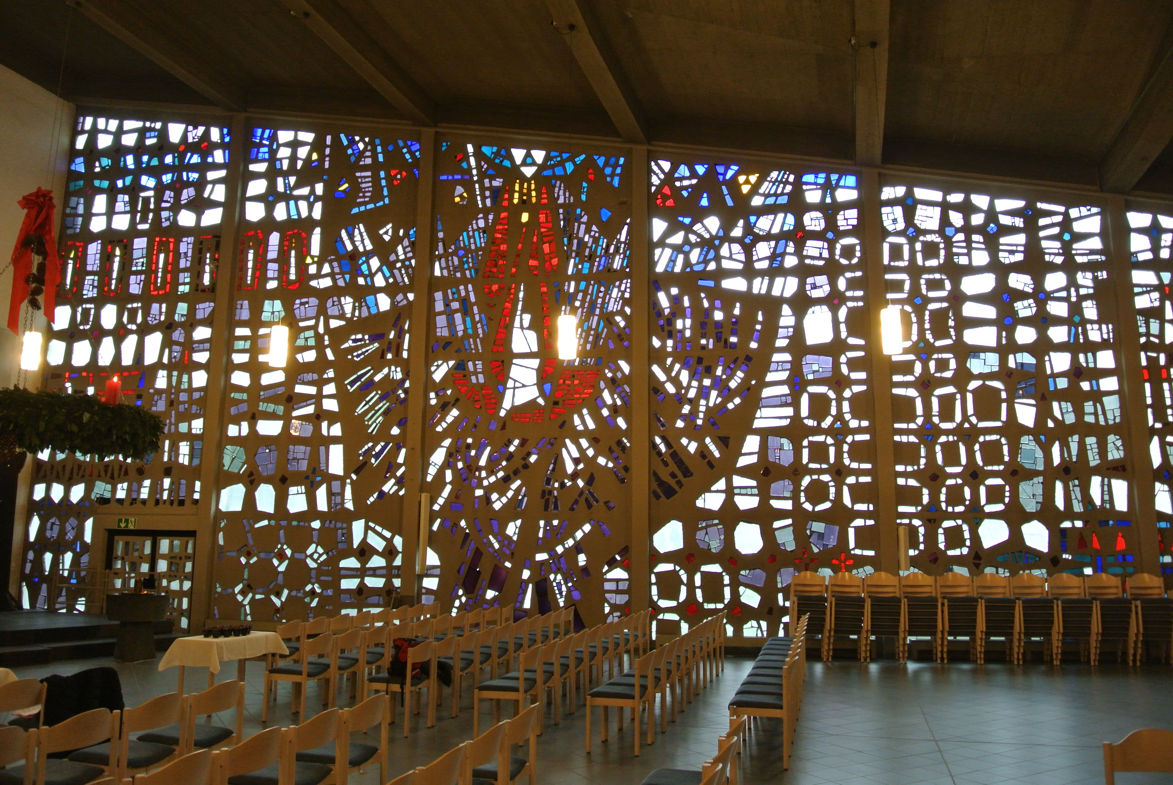 Evangelische Stephanuskirche in Frankfurt-Unterliederbach von 1964, Architekt Ernst Görcke, Innenraum Südwand